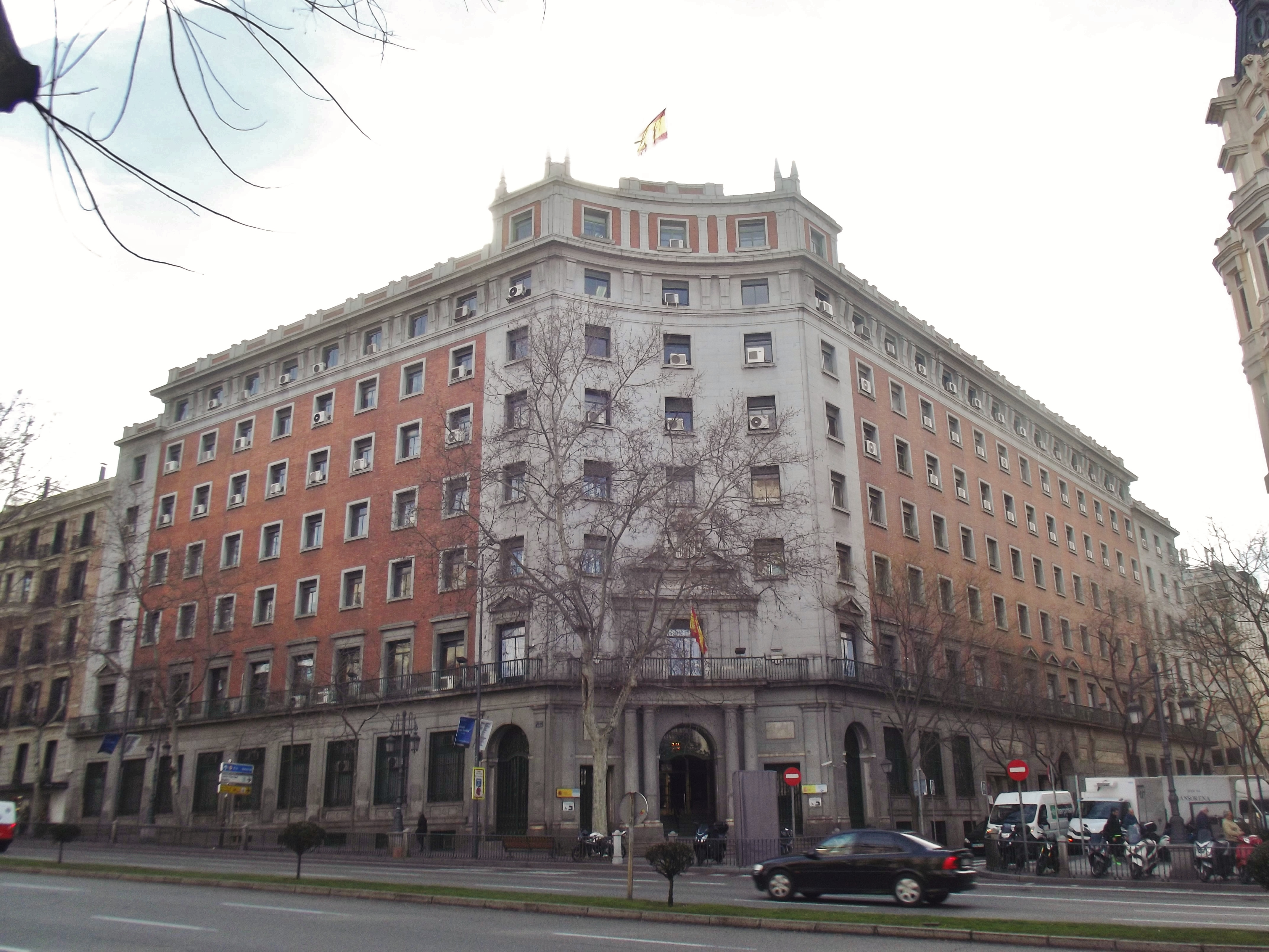 Edificio en Alcalá 56, Madrid.